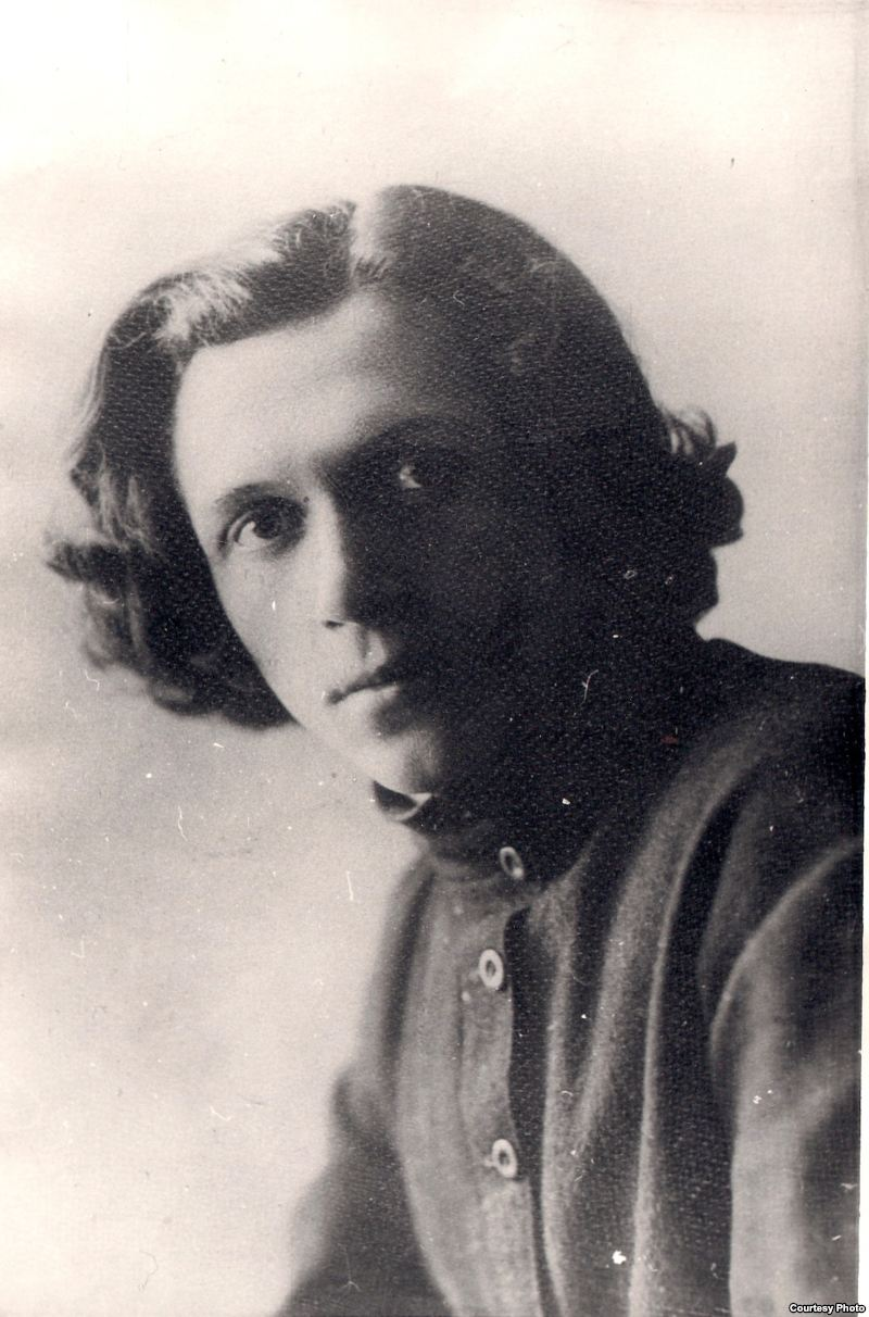 Беларуская (тарашкевіца): Беларускі паэт Міхась Чарот